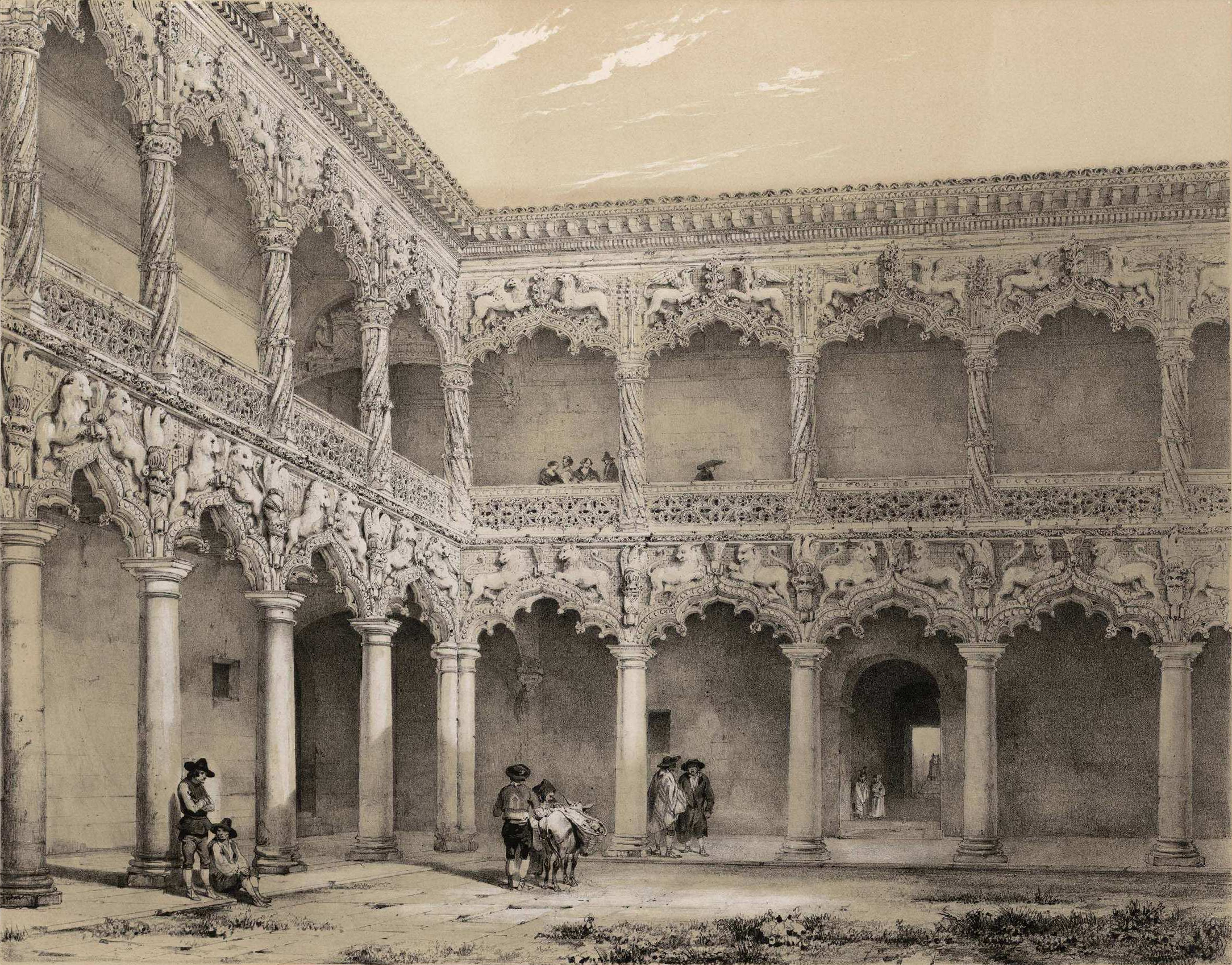 Patio del Palacio de los Duques del Infantado en Guadalajara (España). Estampa litográfica de Jenaro Pérez Villaamil publicada en 1842, en París, en el primer tomo del libro España artística y monumental.